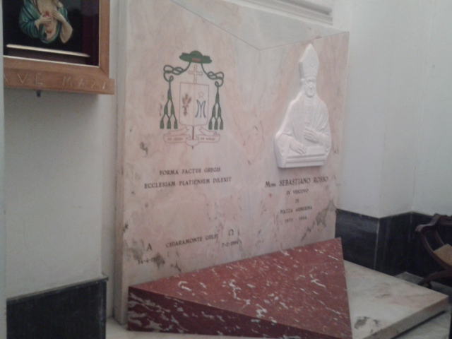 La tomba di S.E. Mons. Sebastiano Rosso